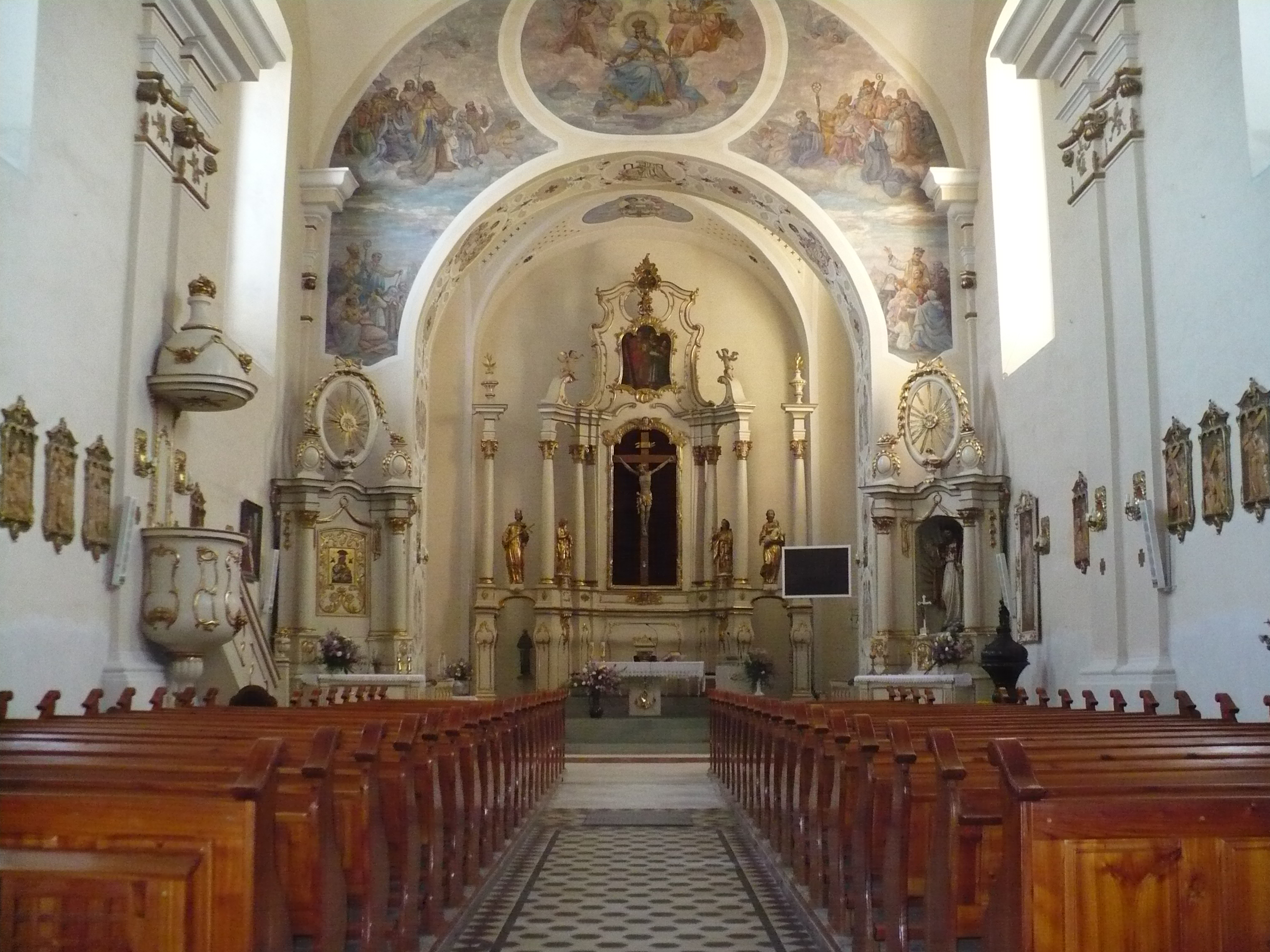 Więcbork, pl. Zwycięstwa 1 - kościół parafialny p.w. śś. Szymona i Judy, 1772-1778, wnętrze (zabytek nr A/314)